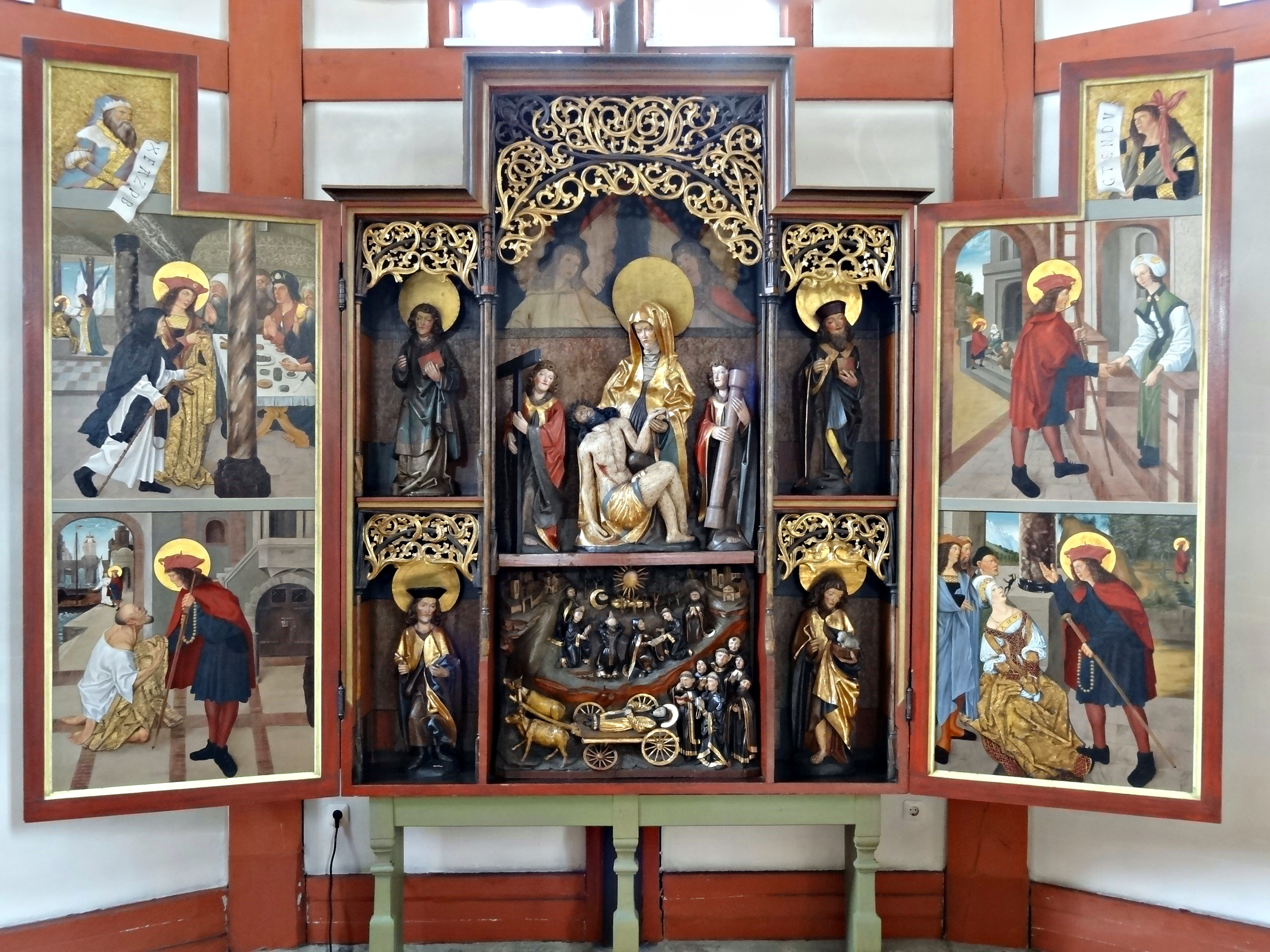 Ehemalige Hospitalkapelle St. Wendelin (Butzbach)